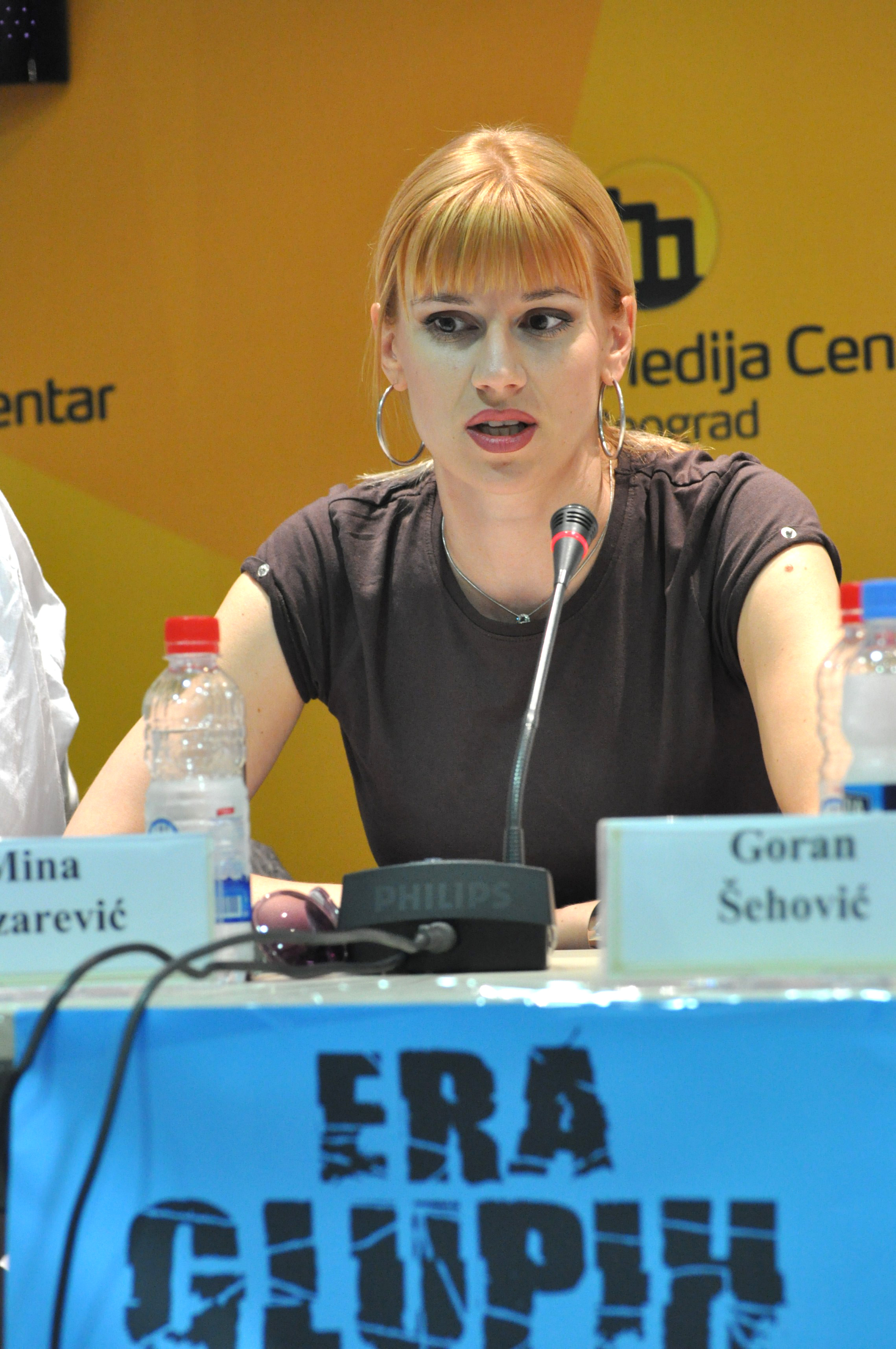 Mina Lazarević Medija Centar